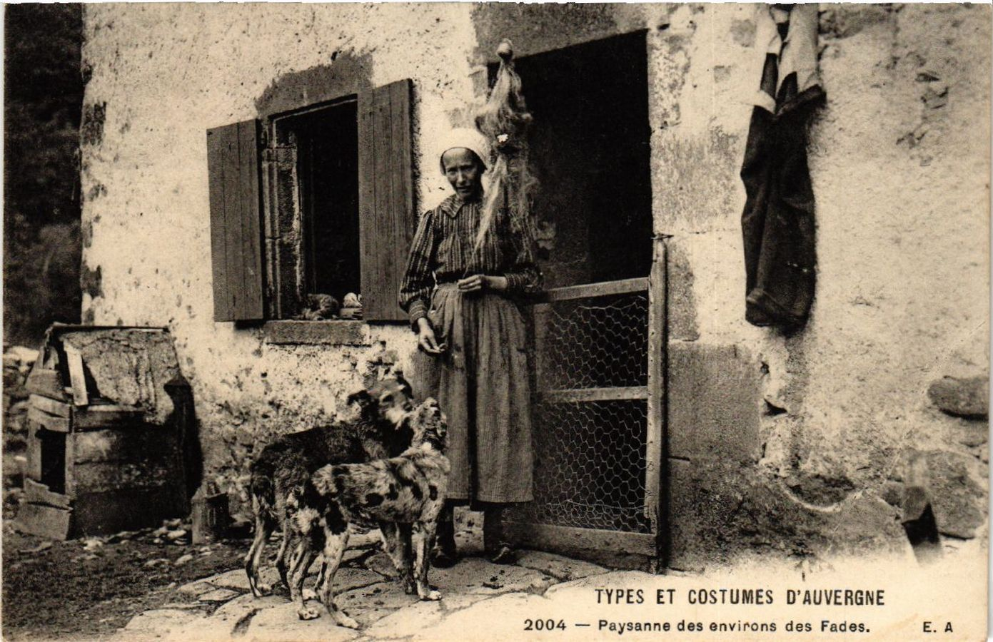 Types et Costumes d'Auvergne Paysanne des environs des Fades, Puy-de-Dôme. Paysanne avec ses chiens de berger d'Auvergne. Début du XXe siècle